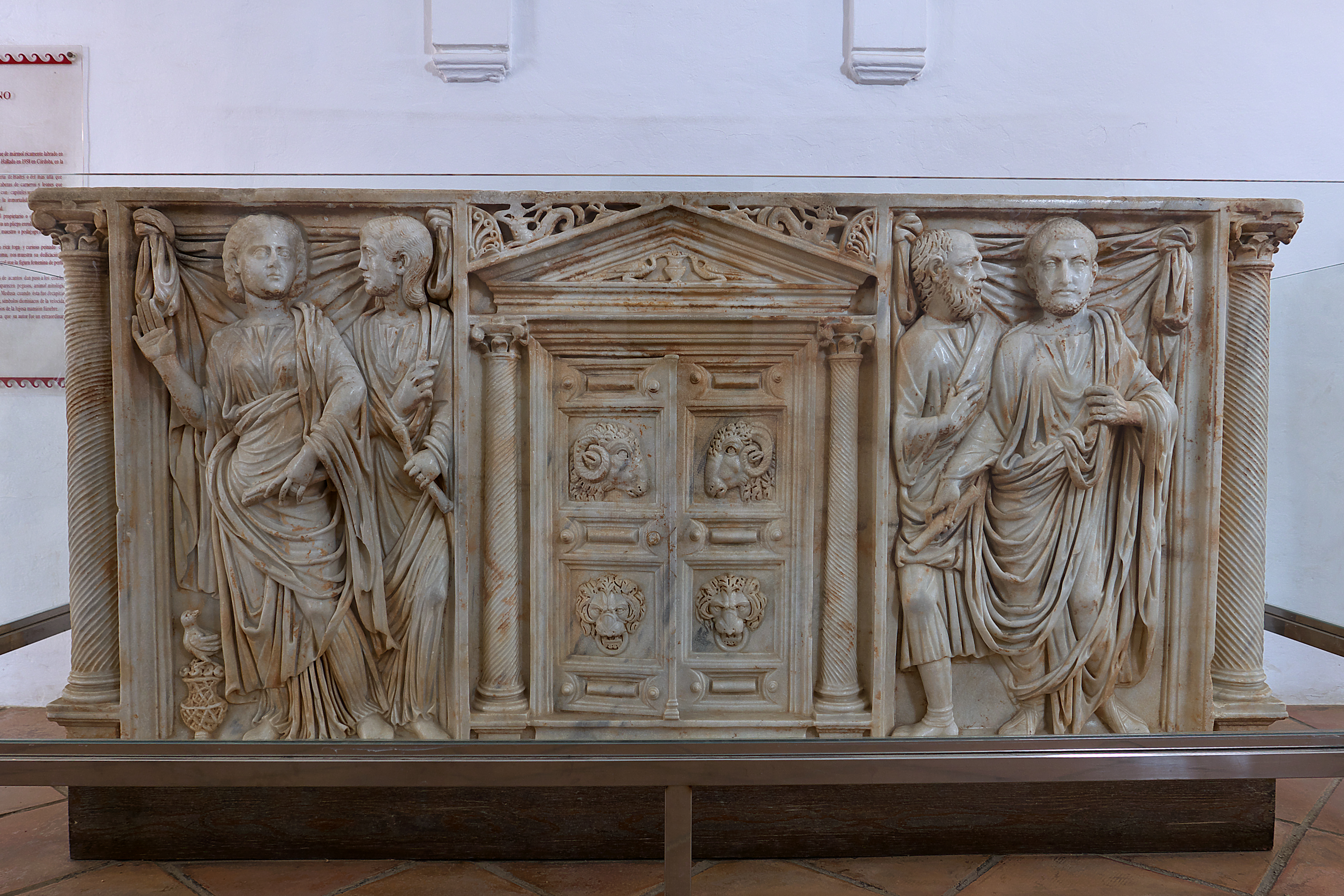 Alcázar de los Reyes Cristianos. Sarcófago hallado en Córdoba, datado hacia el 225 d.C., tallado en Roma de una sola pieza de mármol blanco.